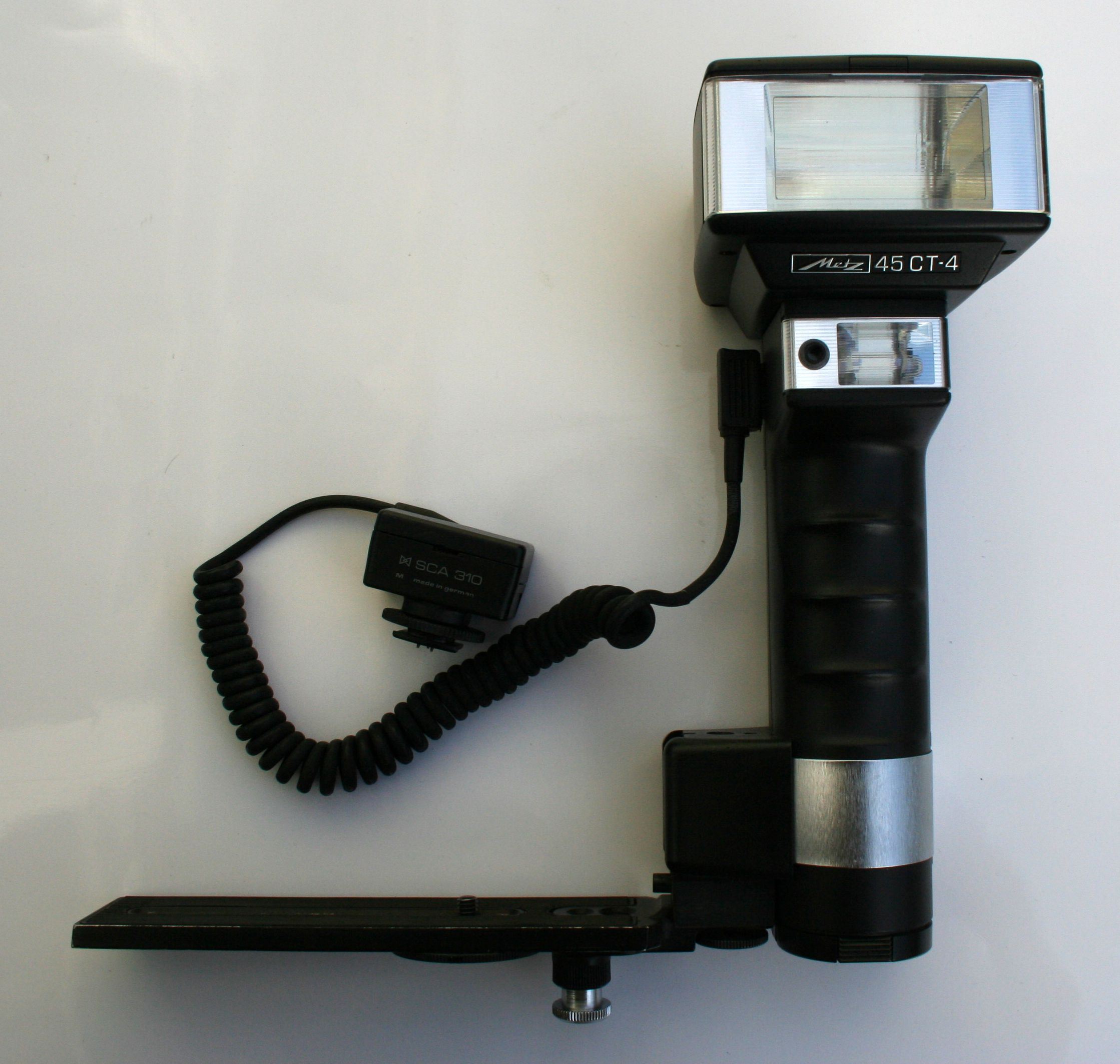 Metz 45 CT-4